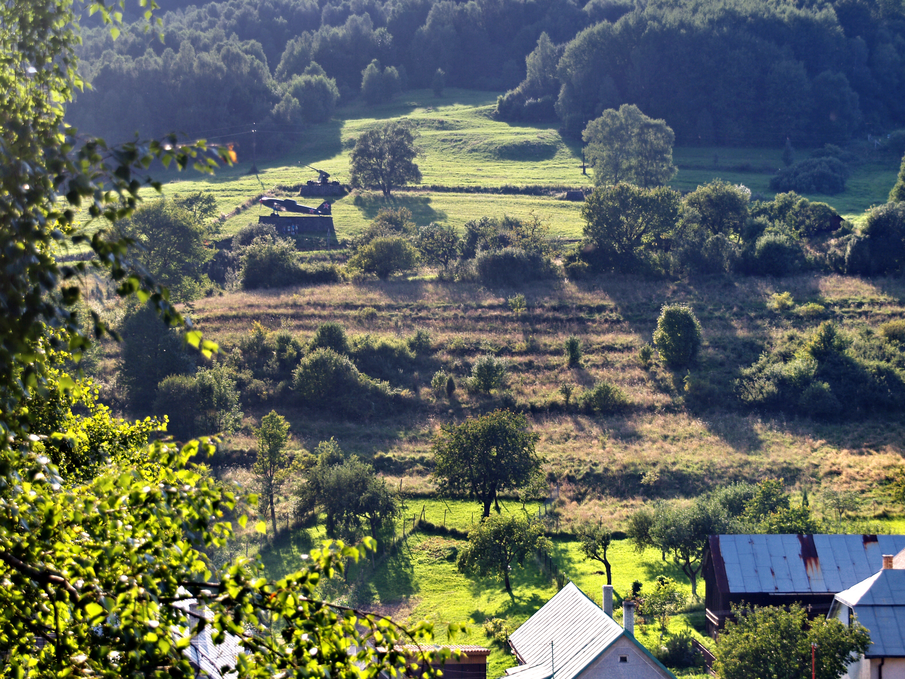 Nižný Komárnik (Slovakia) - Vestiges de la 2e Guerre mondiale, face à l'église Ruthène